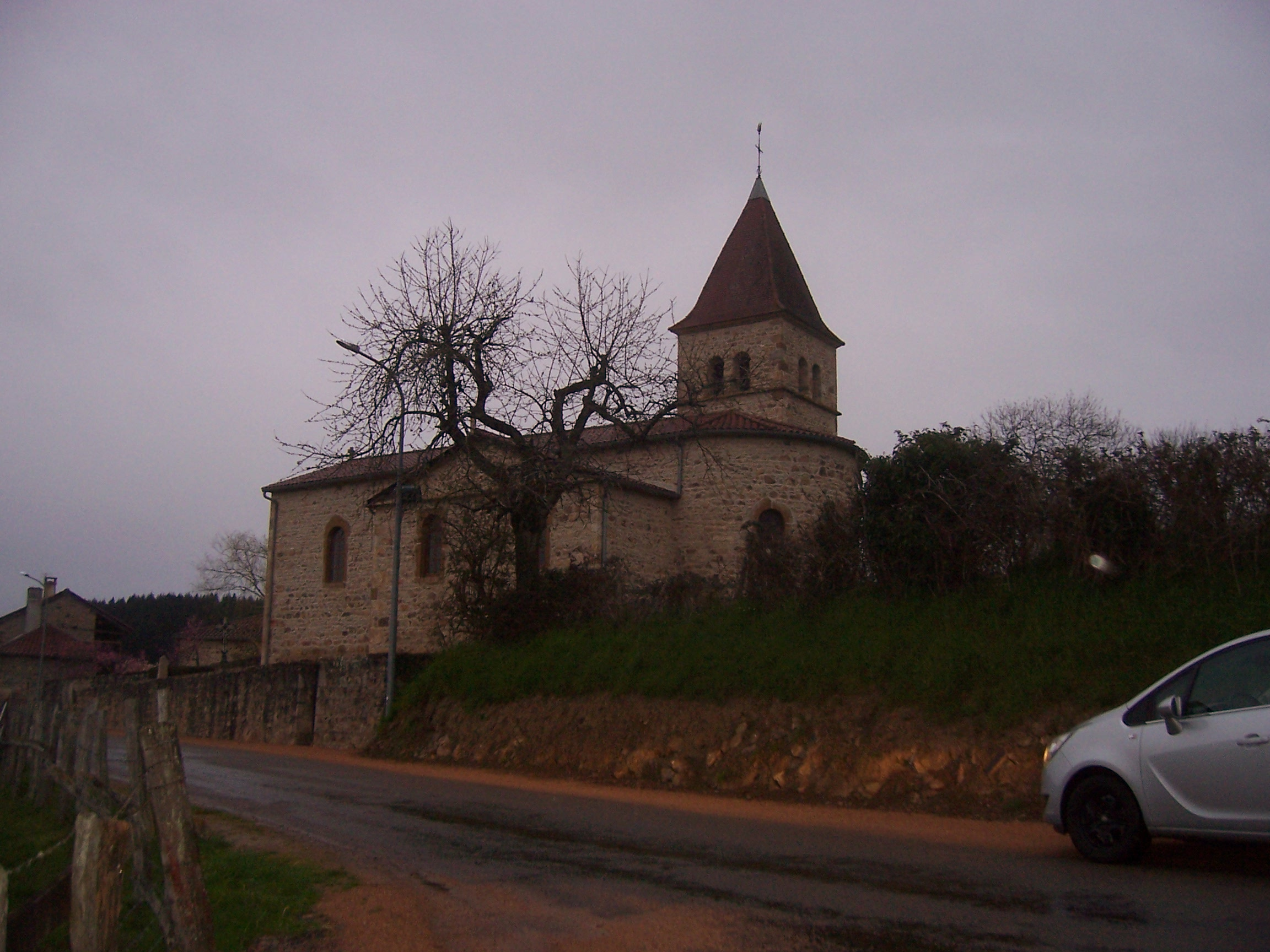 Eglise de Montagny-sur-Grosne